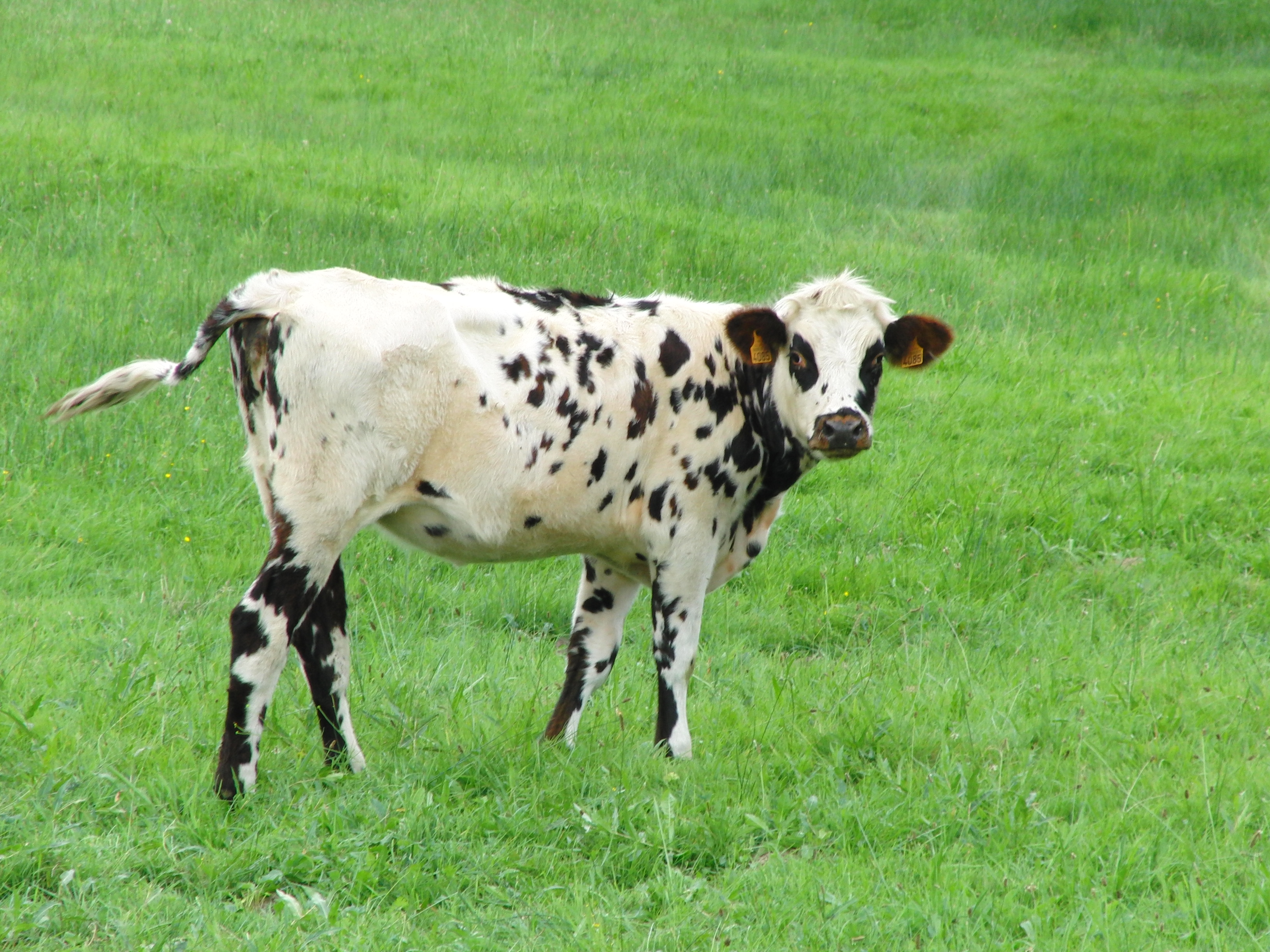 Veau de race normande, Champsecret, Orne, France